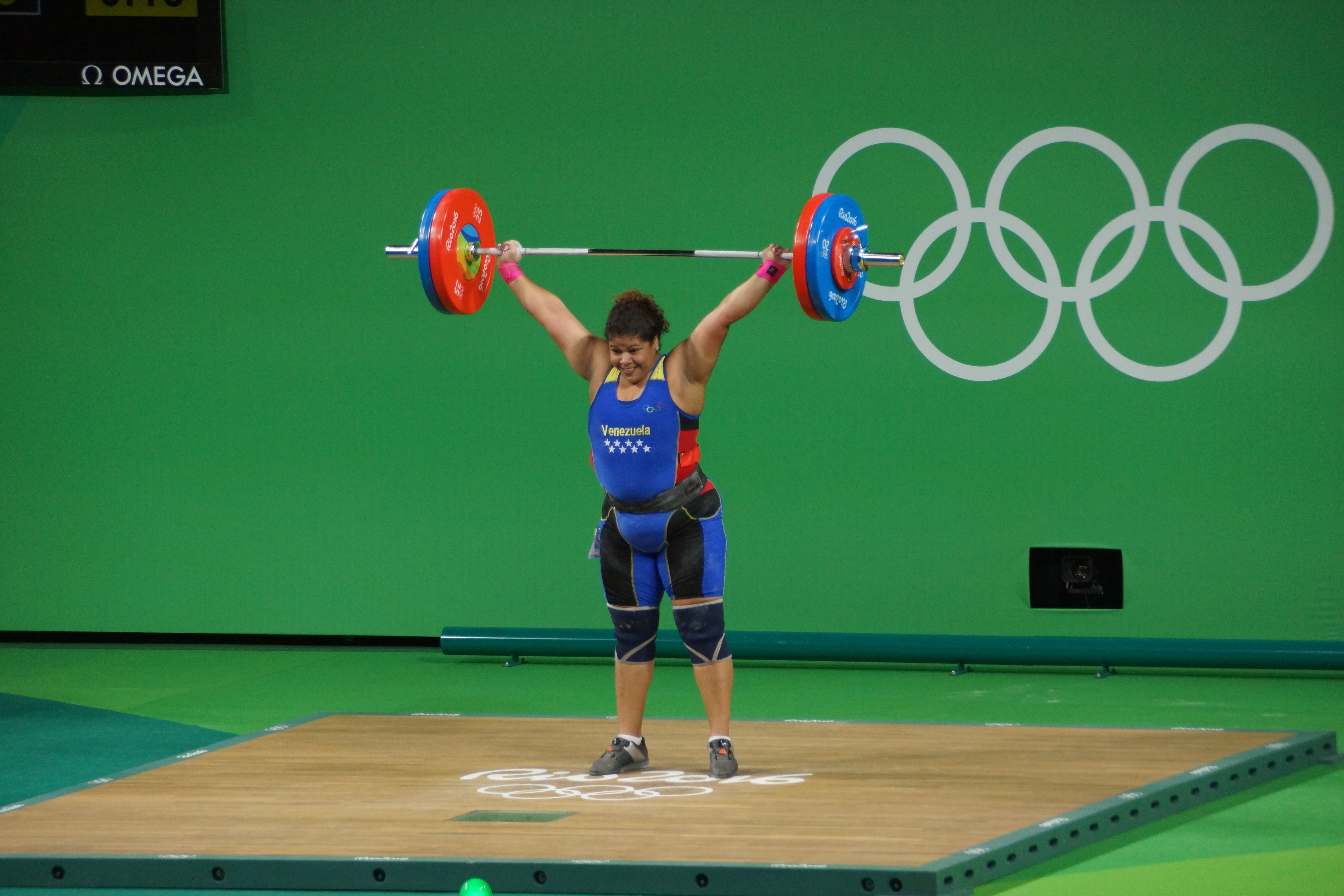 slt.a77